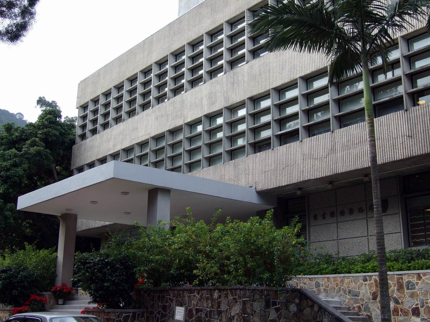 崇基牟路思怡圖書館